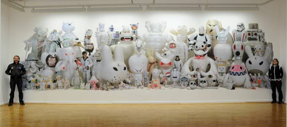 Daniel & Geo Fuchs: Ausstellungswand mit Bildern aus "Toygiants"